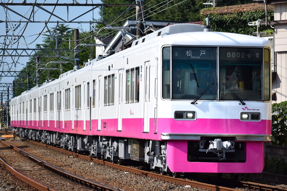 検明け直後の新京成8800形8802編成